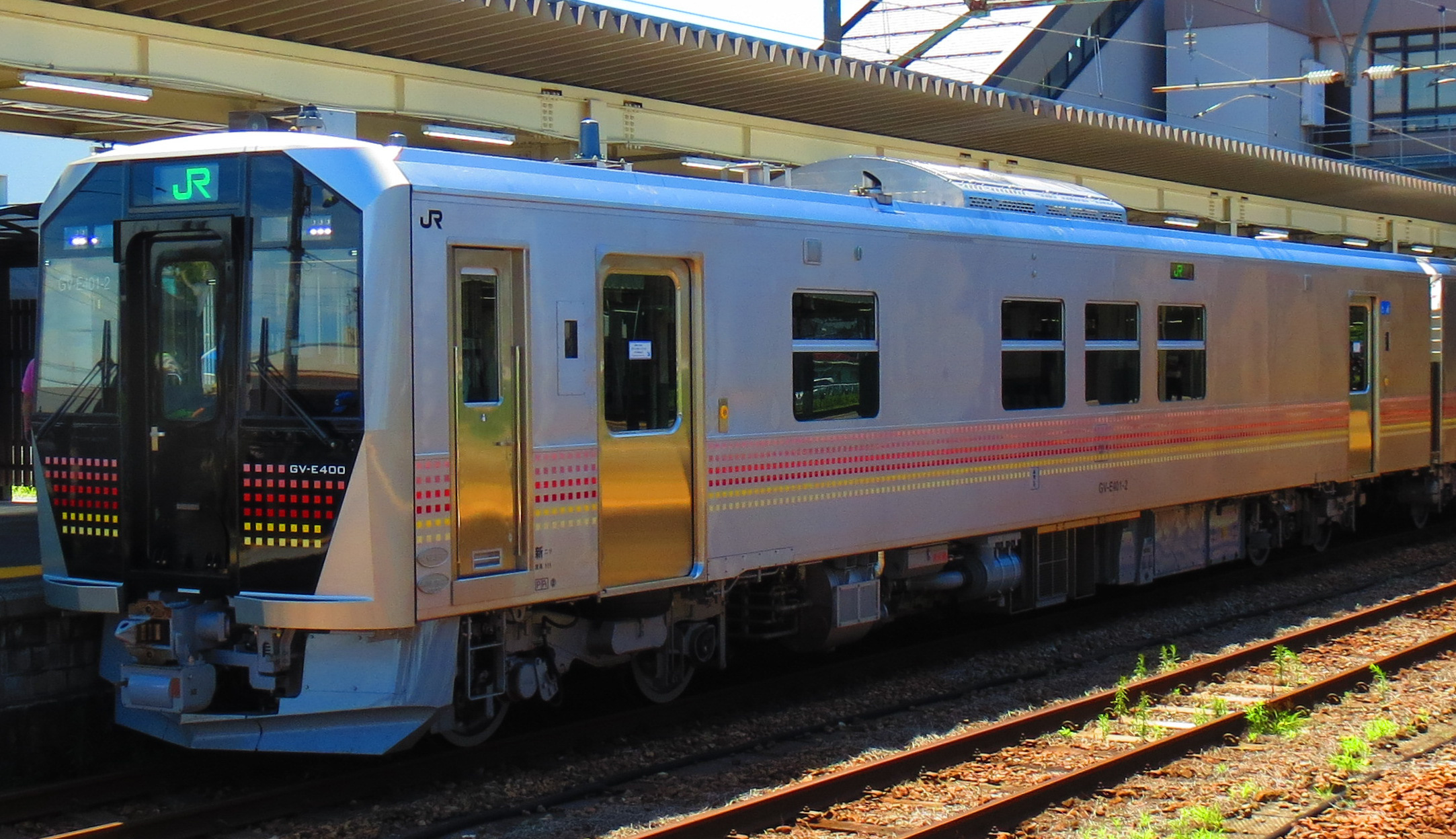 GV-E401形 401-2